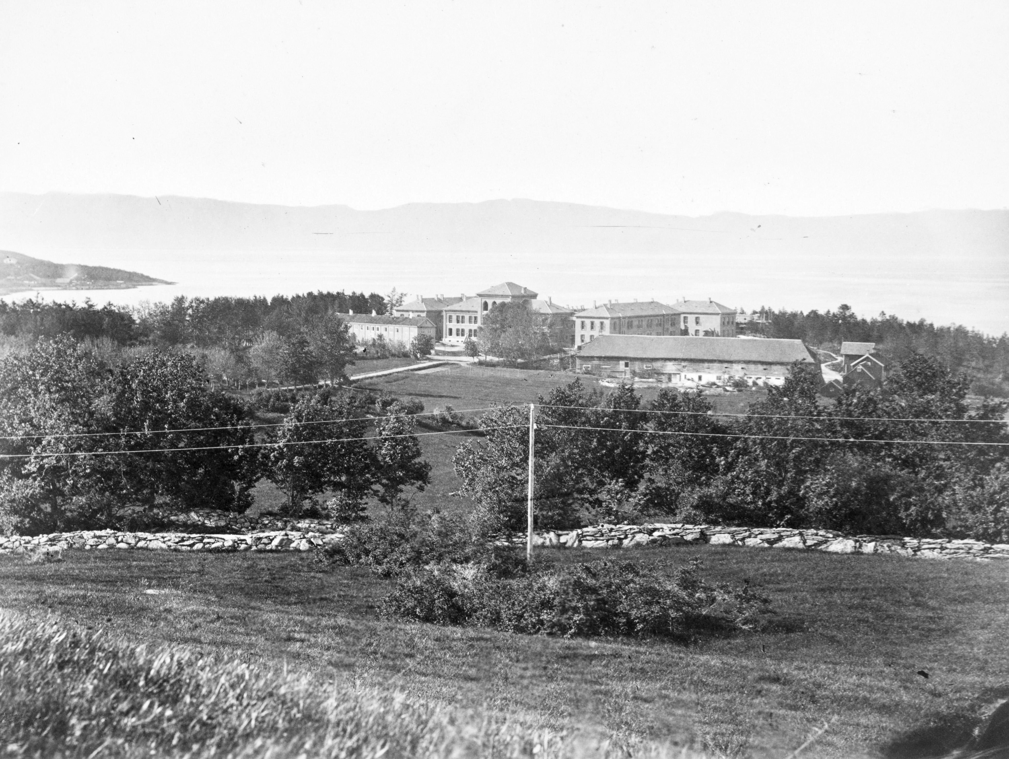 Bildet er hentet fra Nasjonalbibliotekets bildesamling Rotvoll, Trondheim, Sør Trøndelag